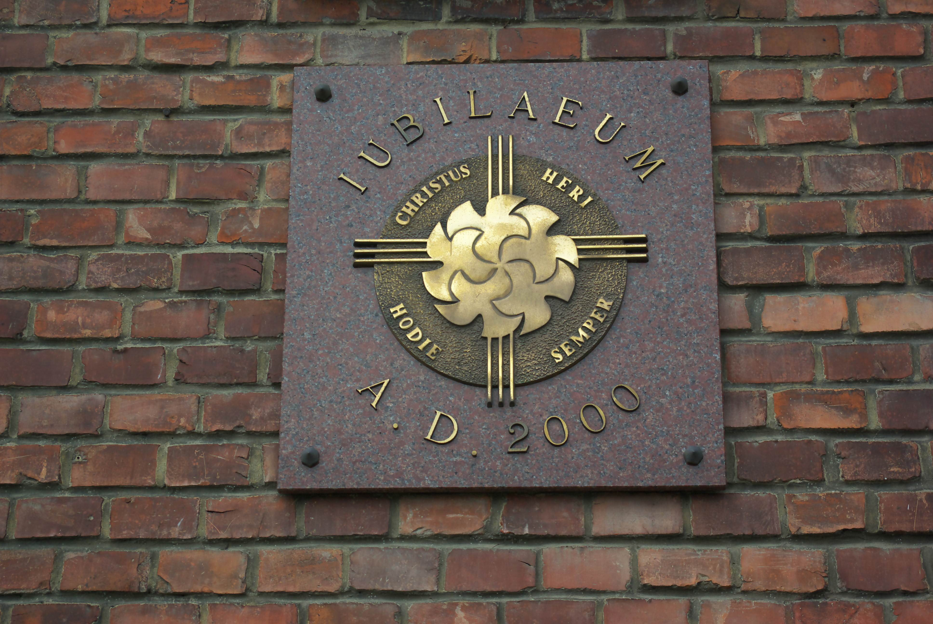 Kościół Najświętszego Serca Pana Jezusa w Sanoku. Tablica pamiątkowa upamiętniająca Iubilaeum A.D. 2000